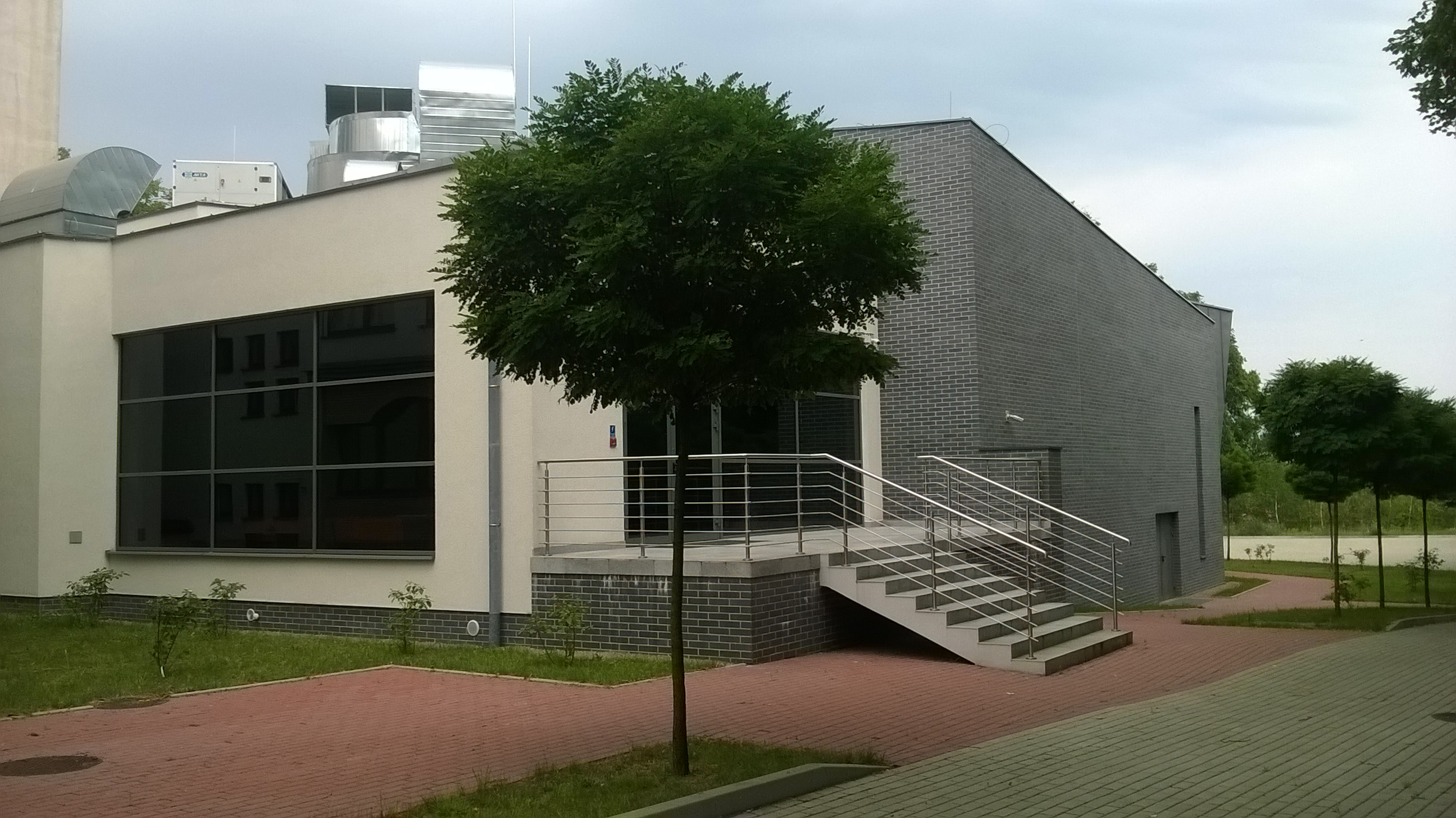 Wydz.Elektr.ZUT-ul.26-kwietnia-nr10